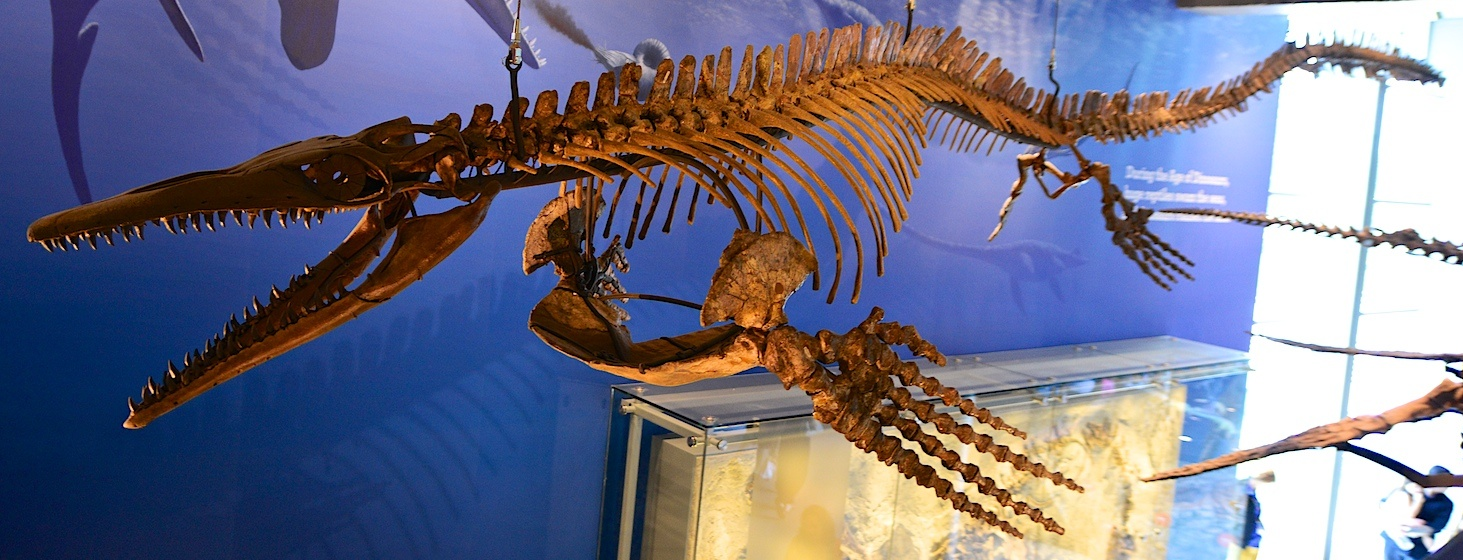 Sea Serpents.